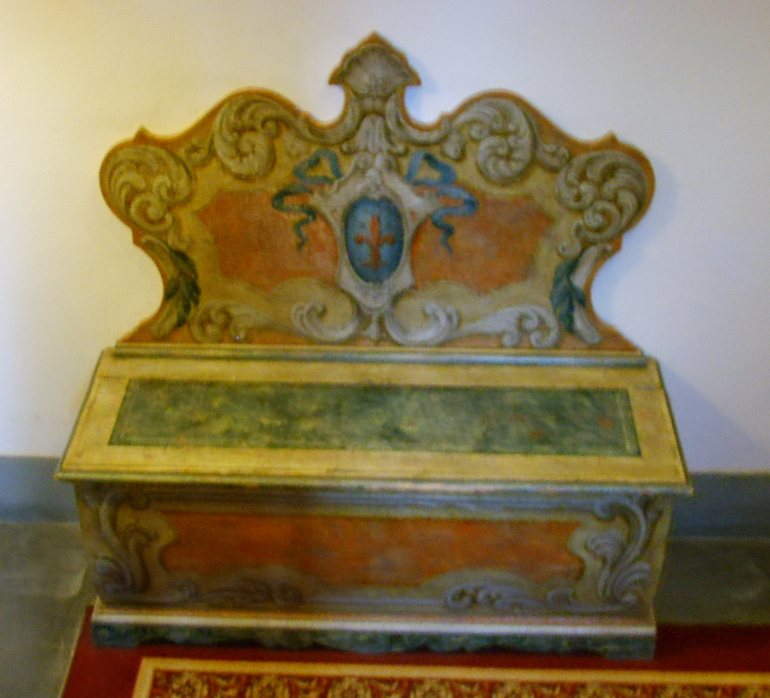 Truhenbank, Kastenbank